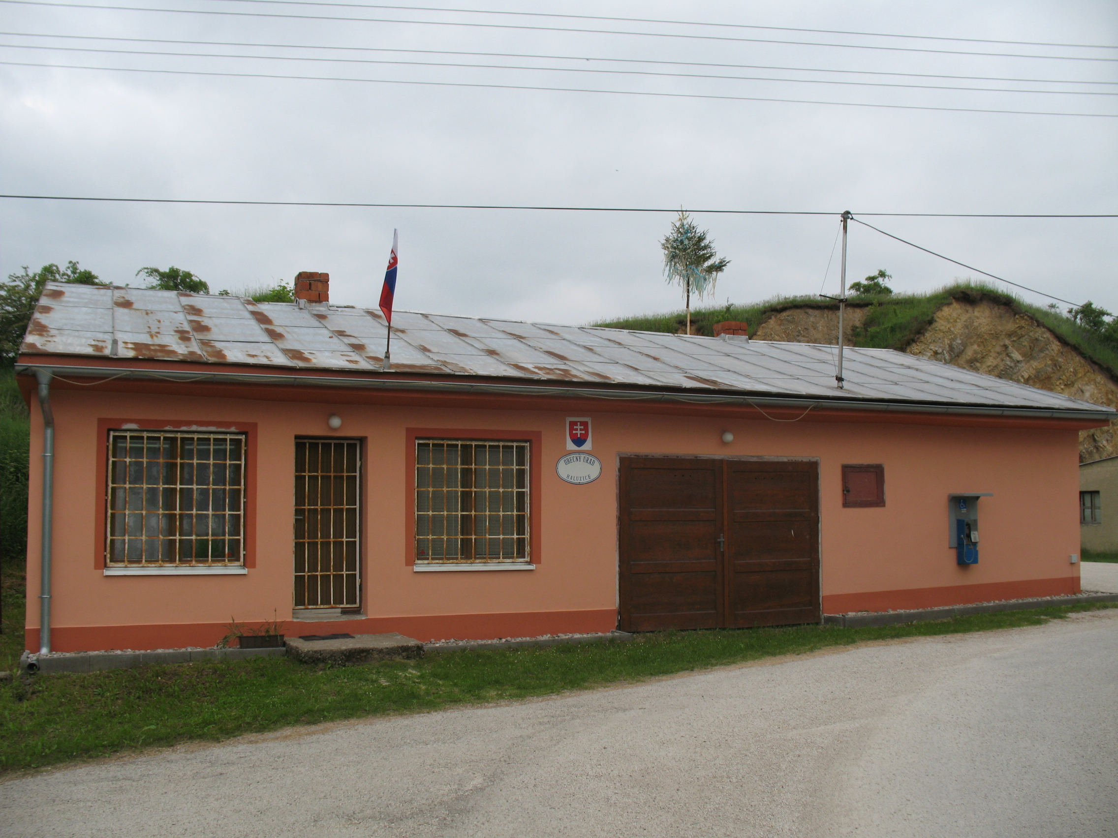 Gallyas